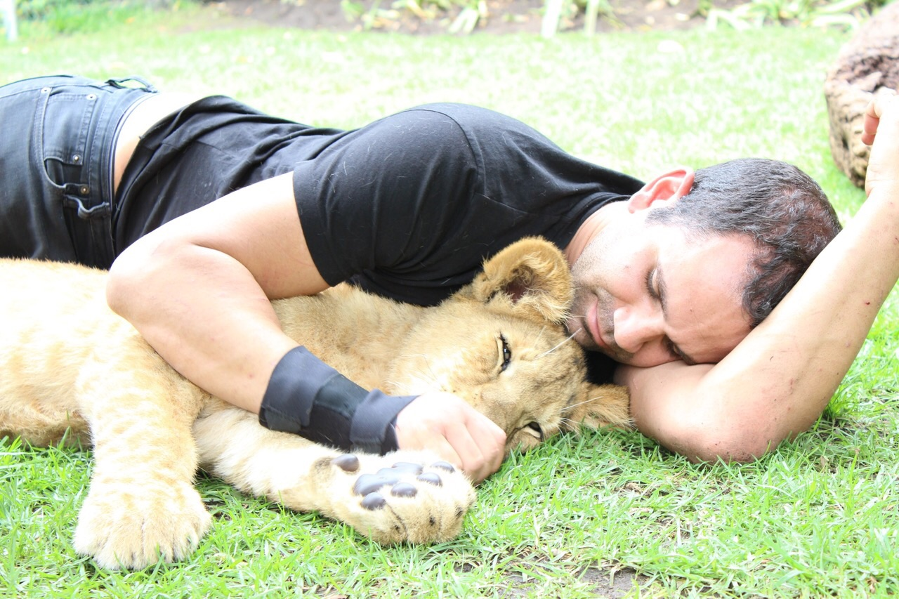 Pure Love